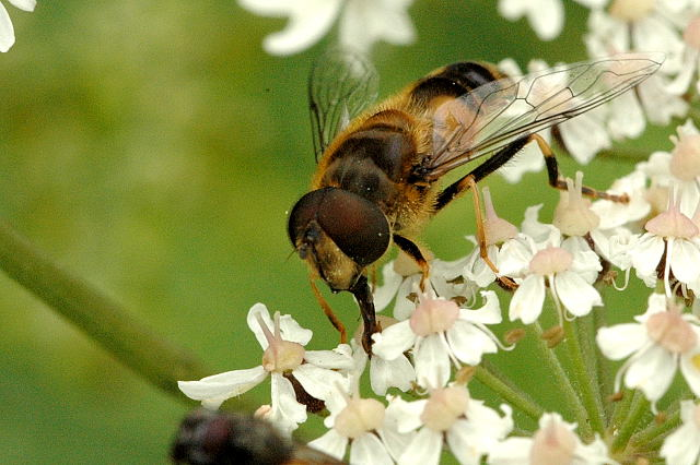 Picture taken in Commanster, Belgian High Ardennes . Species: male Eristalis interrupta